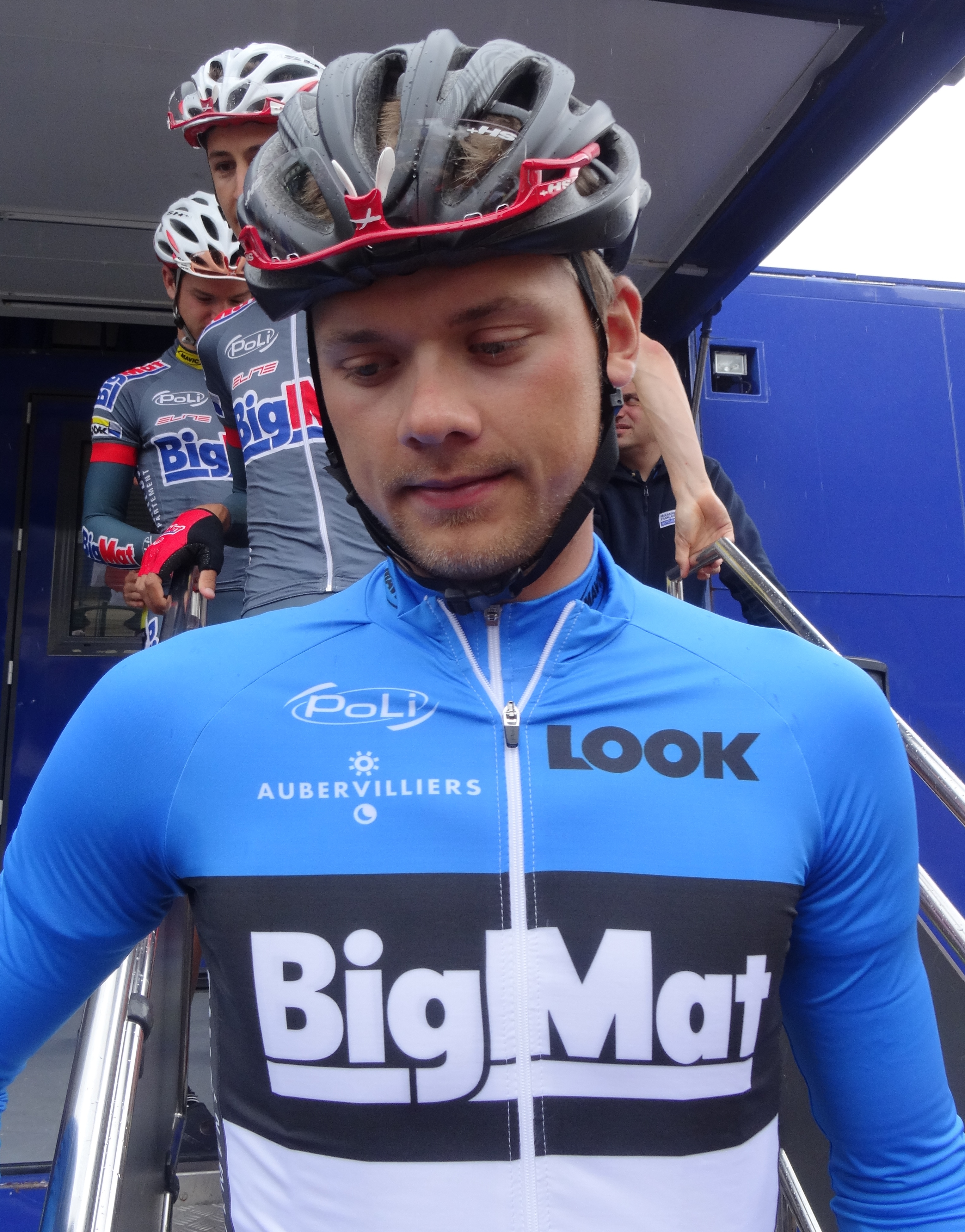 Reportage photographique réalisé le dimanche 13 juillet à l'occasion du départ et de l'arrivée de la Ronde pévéloise 2014 à Pont-à-Marcq, Nord-Pas-de-Calais, France.